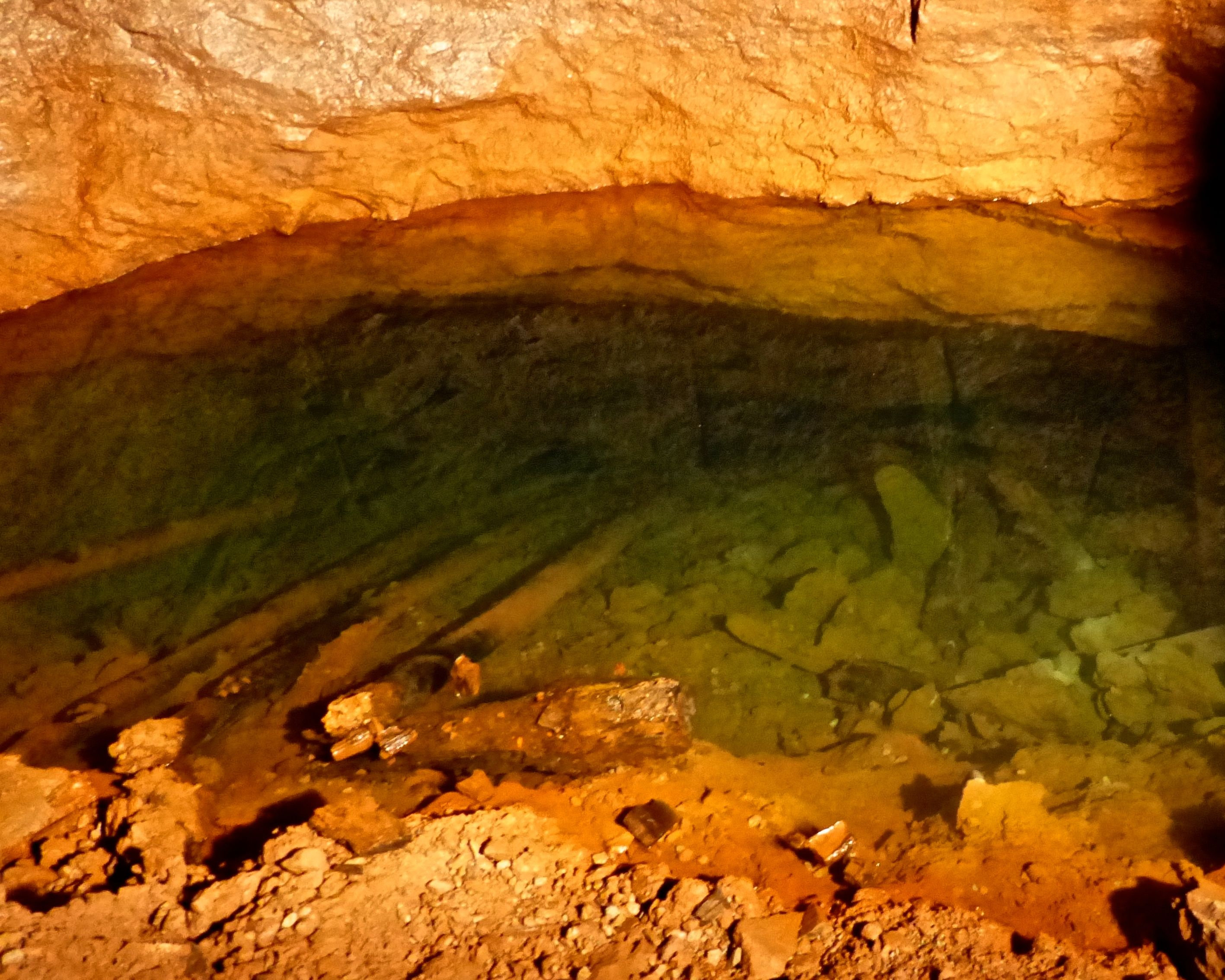 Philippstollen des Briloner Eisenberges: Abgesoffener Grubenbau